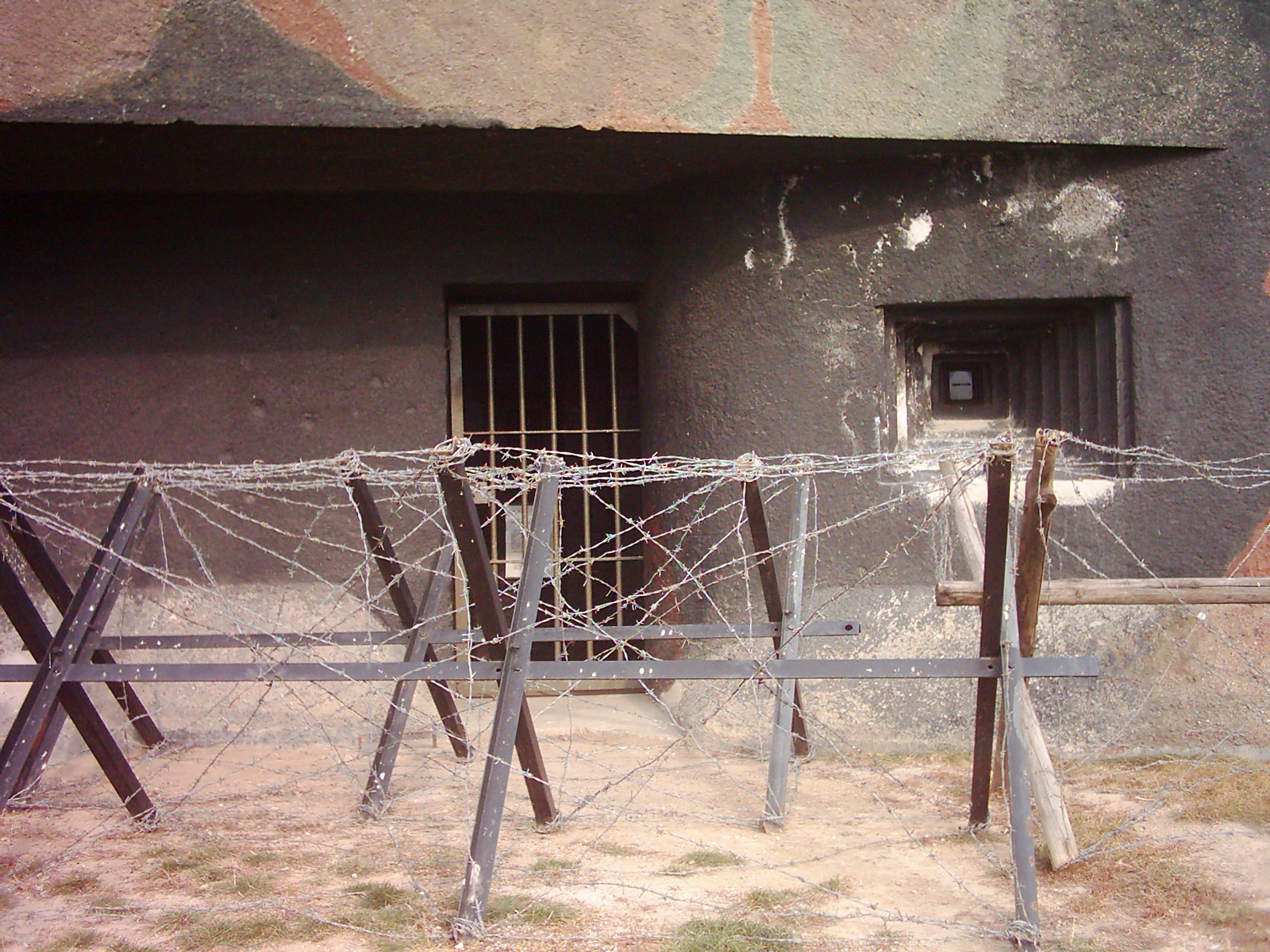 Vchod do srubu s ochrannou střílnou (OP-S 25 U triginometru)